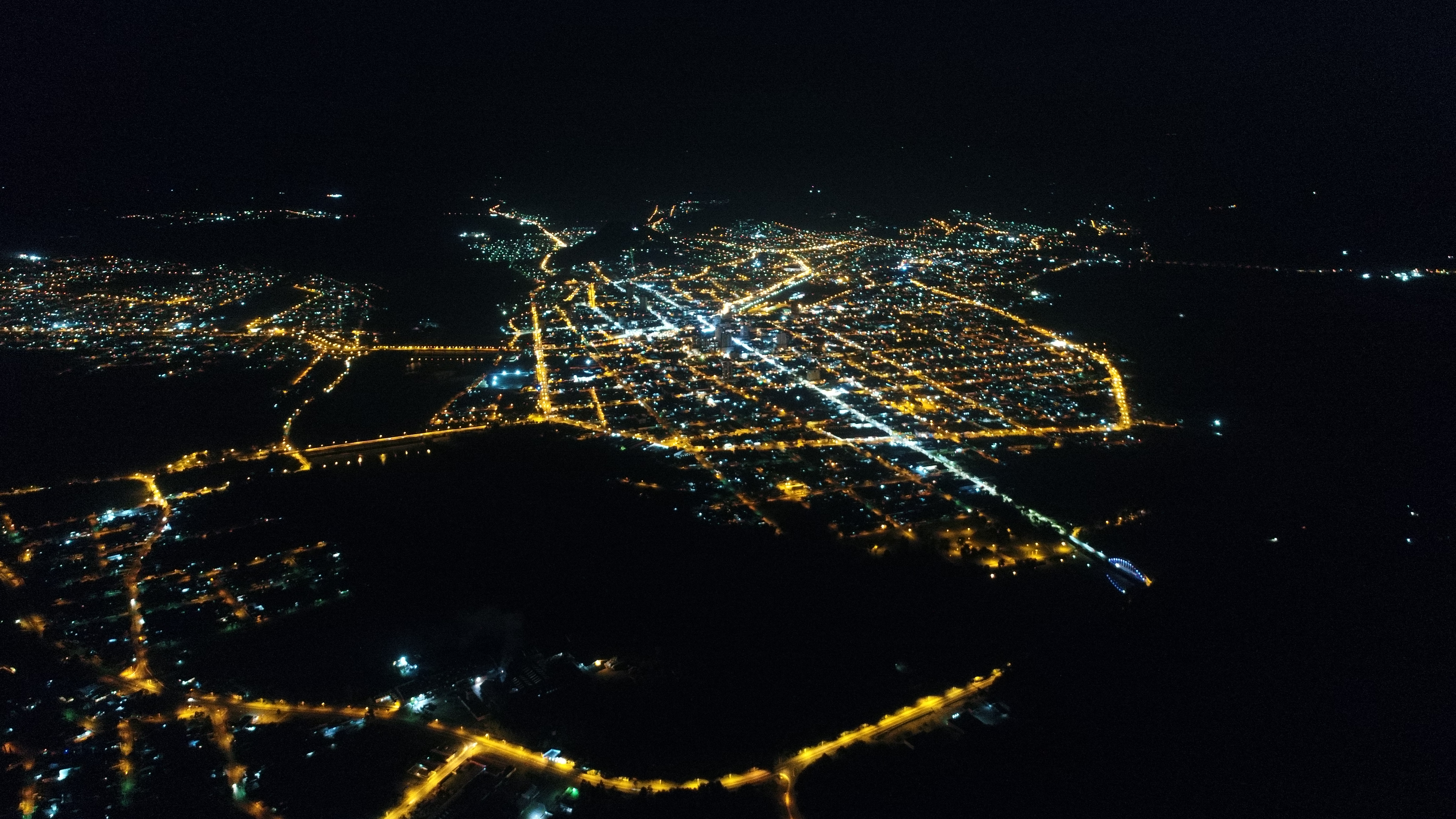 Panorâmica a noite, União da Vitoria e Porto União. Imagem Registrada do alto do morro do Cristo por Anilton B Junior/Marcos Moreira